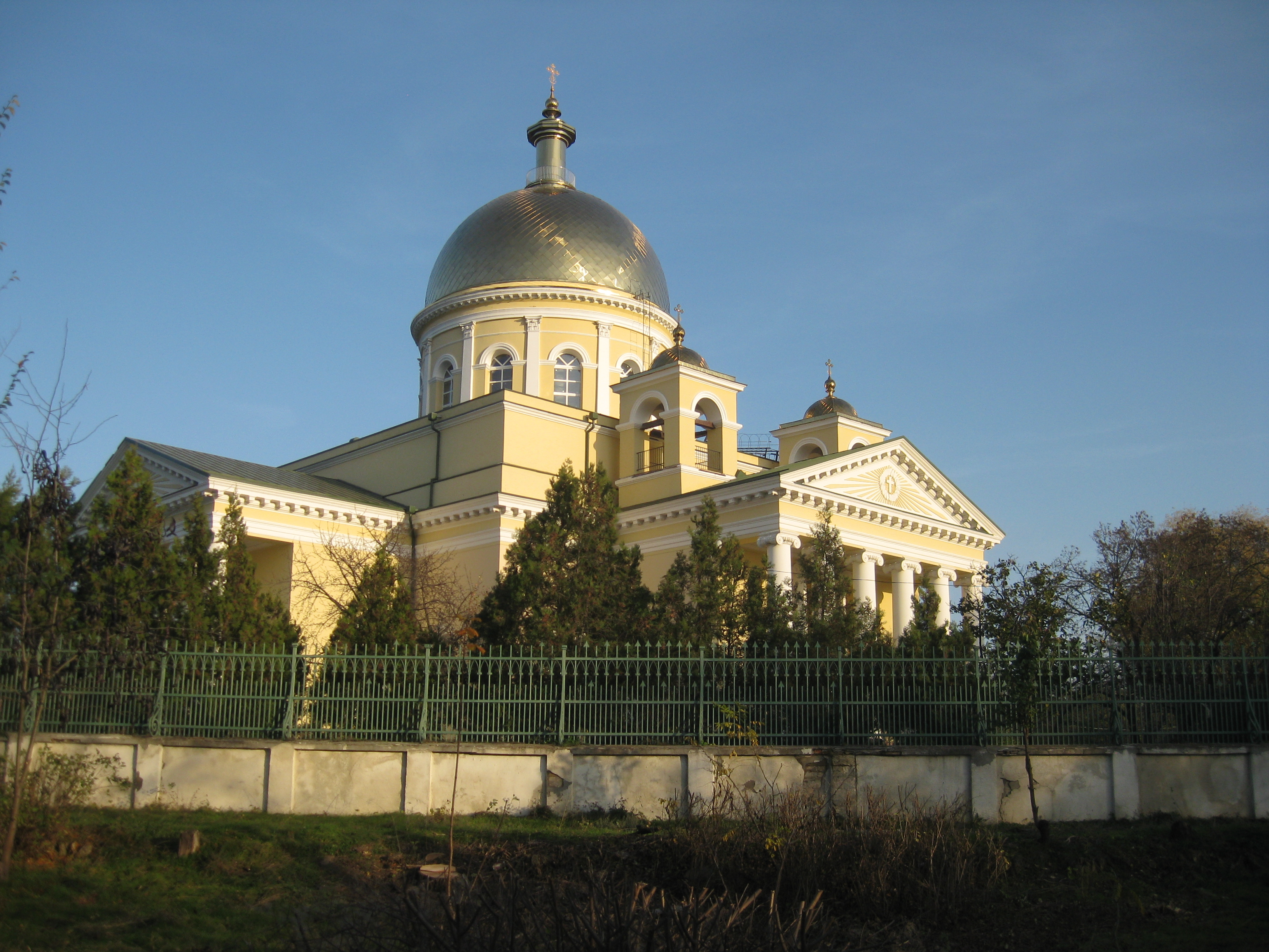 Преображенський собор, Болград, пр-т Леніна, ріг вул. Поштової і Училищної